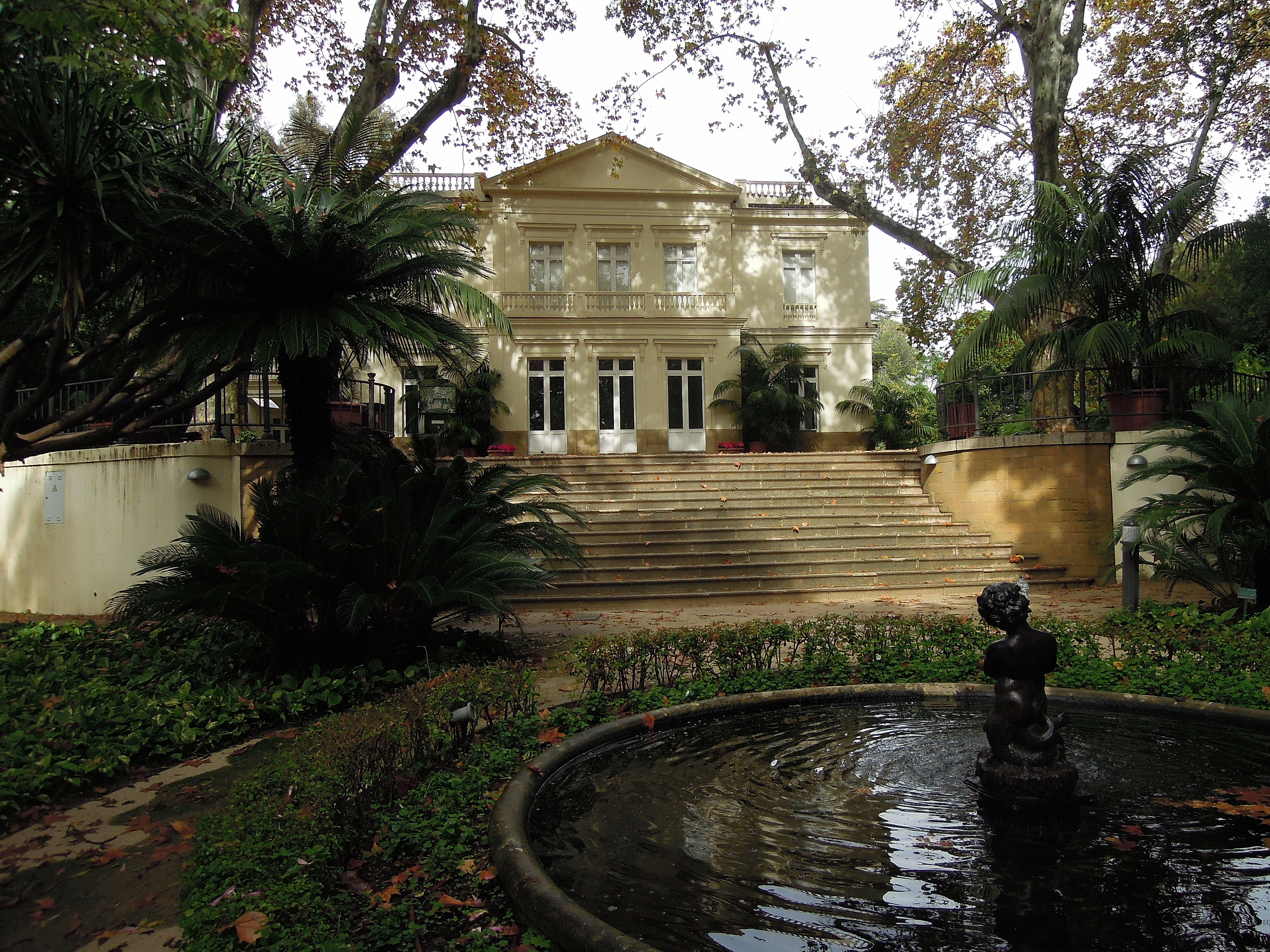 Casa Palacio im Jardín Botánico-Histórico in Málaga